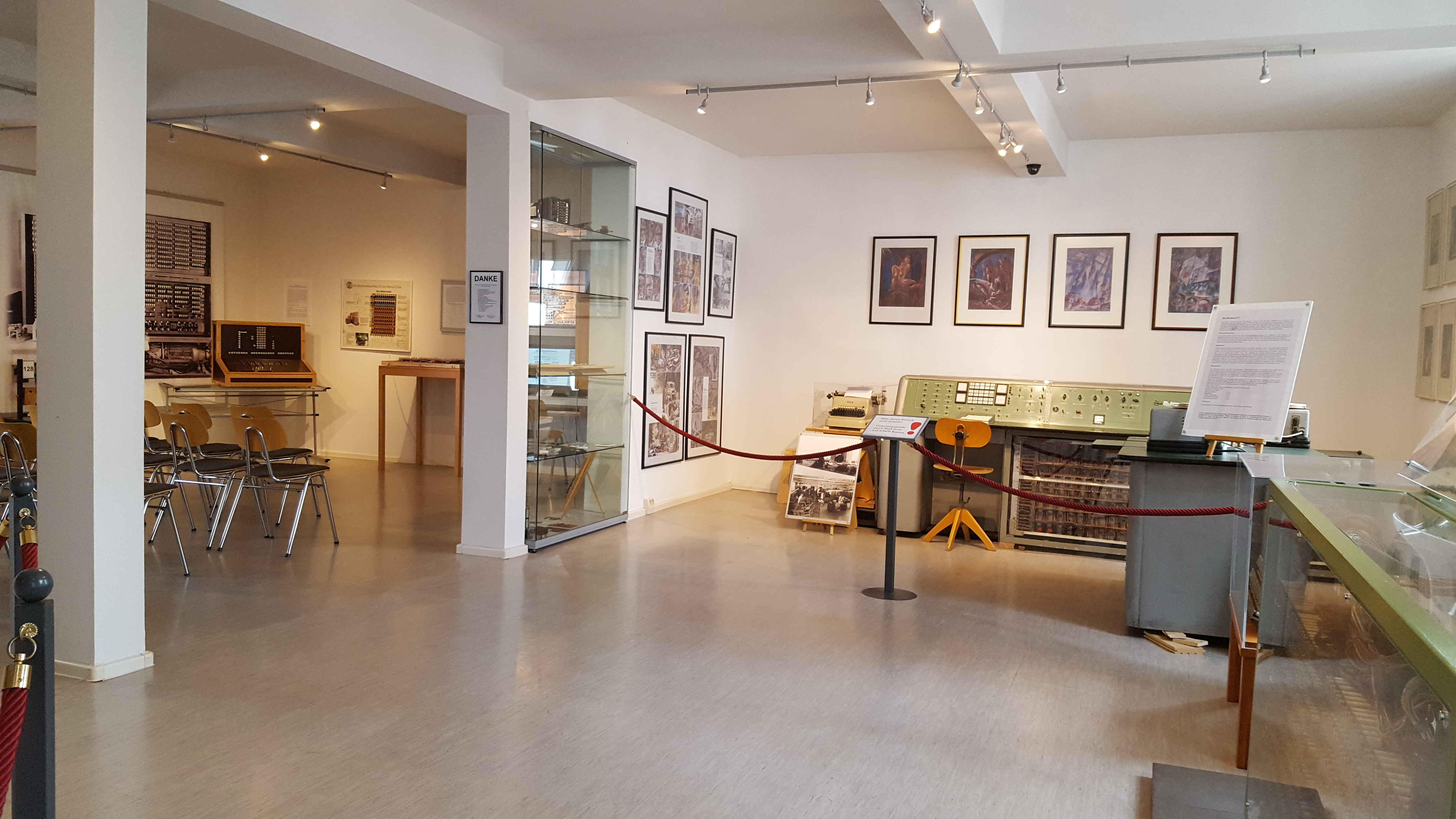 Ausstellungsraum 1 zu Konrad Zuse im Konrad-Zuse-Museum Hünfeld mit Stadt- und Kreisgeschichte